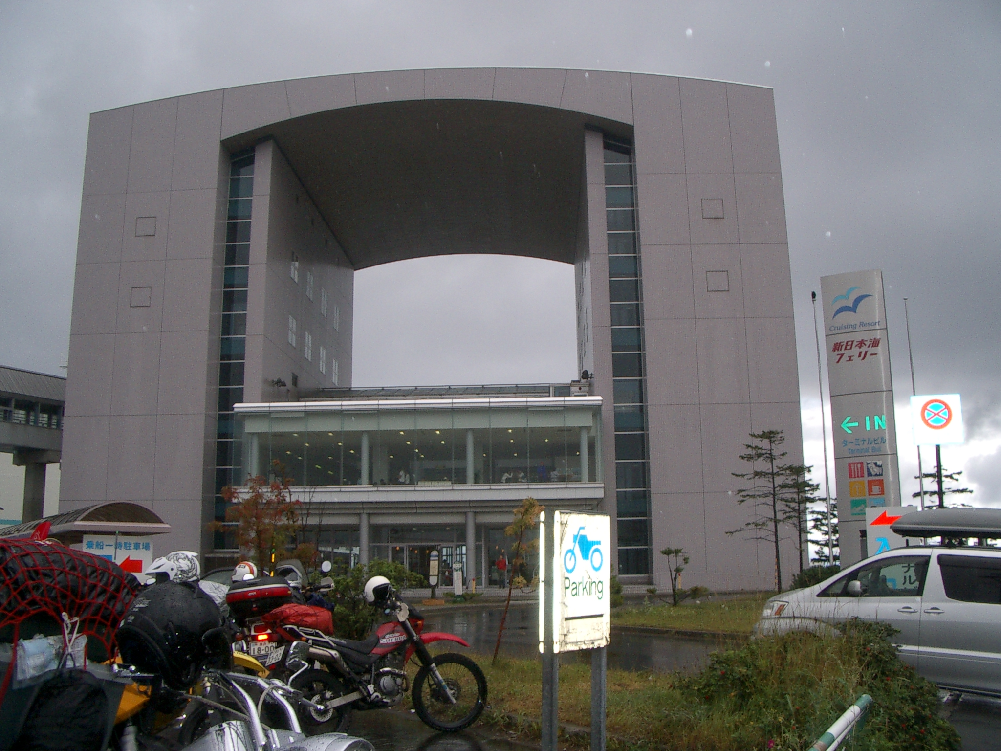 新日本海フェリーターミナル 小樽港勝納埠頭にある